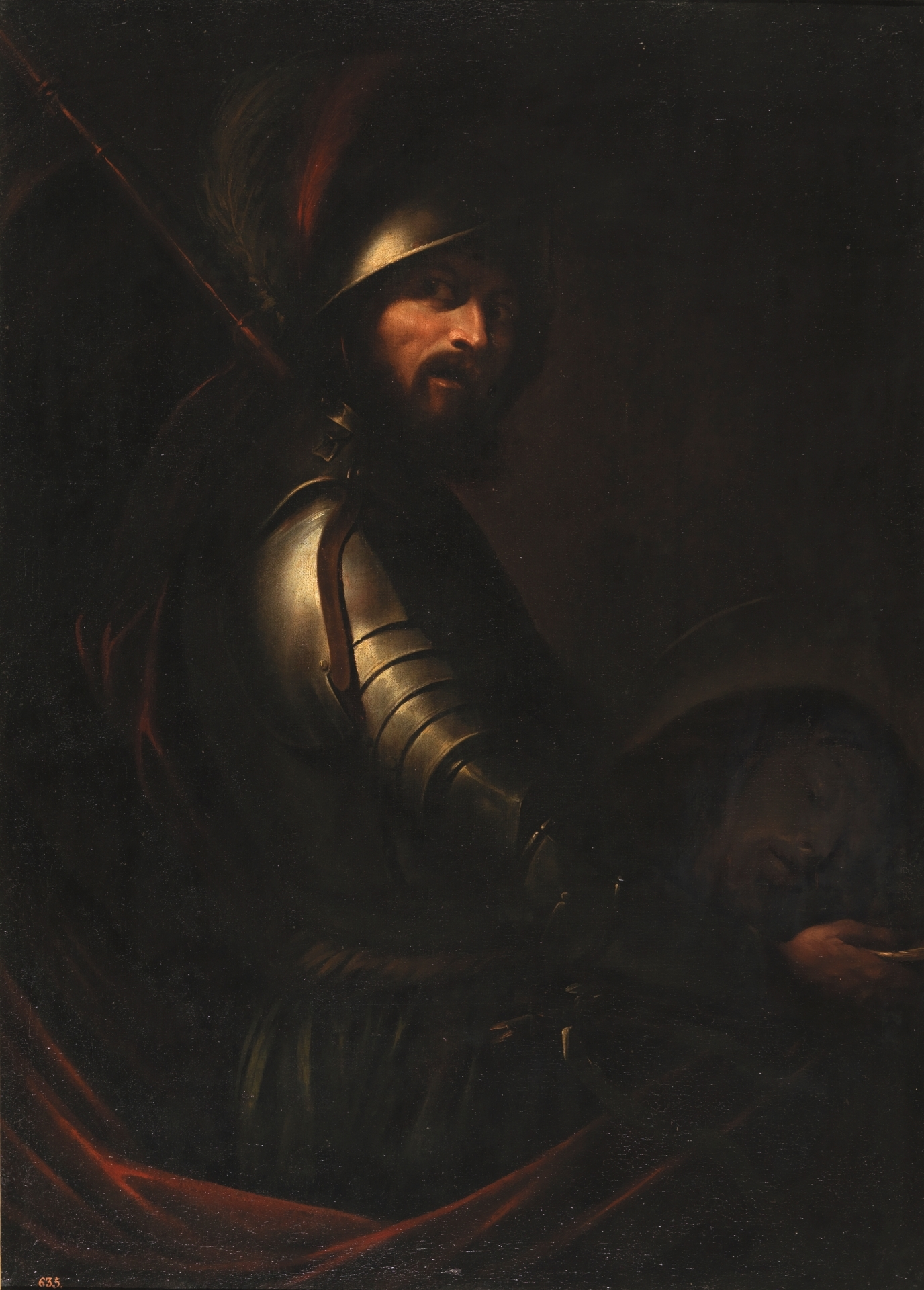 La obra representa a un soldado portando la cabeza del profeta San Juan Bautista, precursor del Mesías.